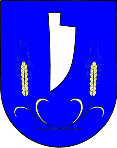 znak, Šanov, okres Znojmo